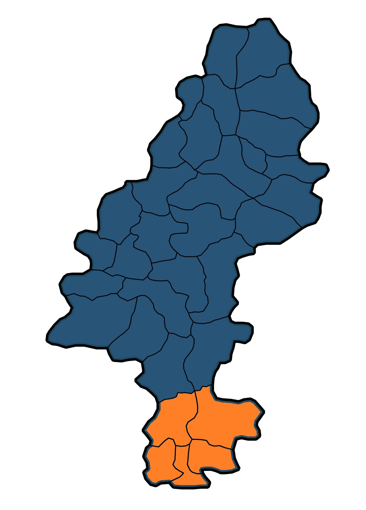 Mapa rejonu sieradzkiego diecezji włocławskiej